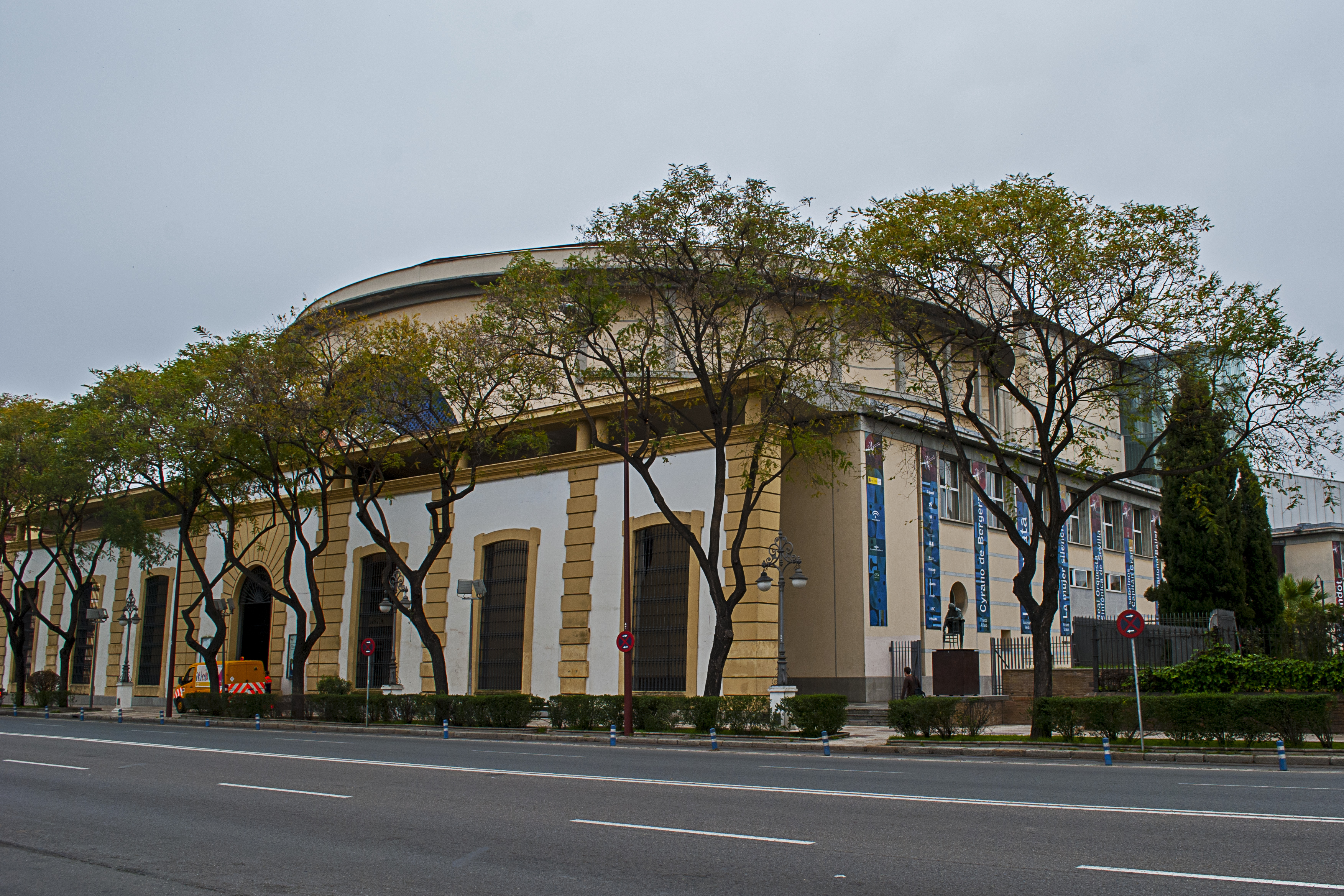 Vista del teatro de la Maestranza (Sevilla)